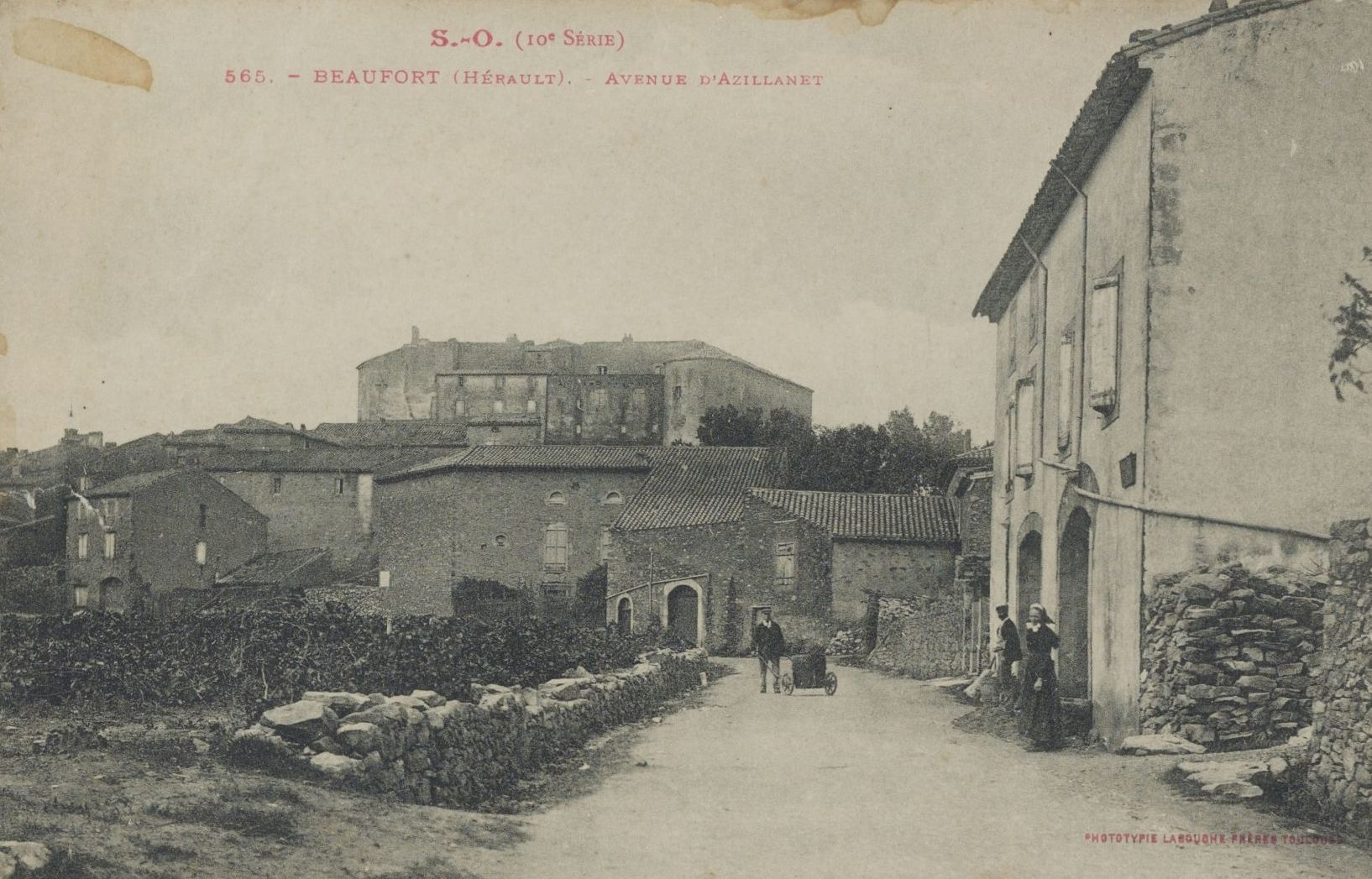 Beaufort. - Avenue d'Azillanet : carte postale